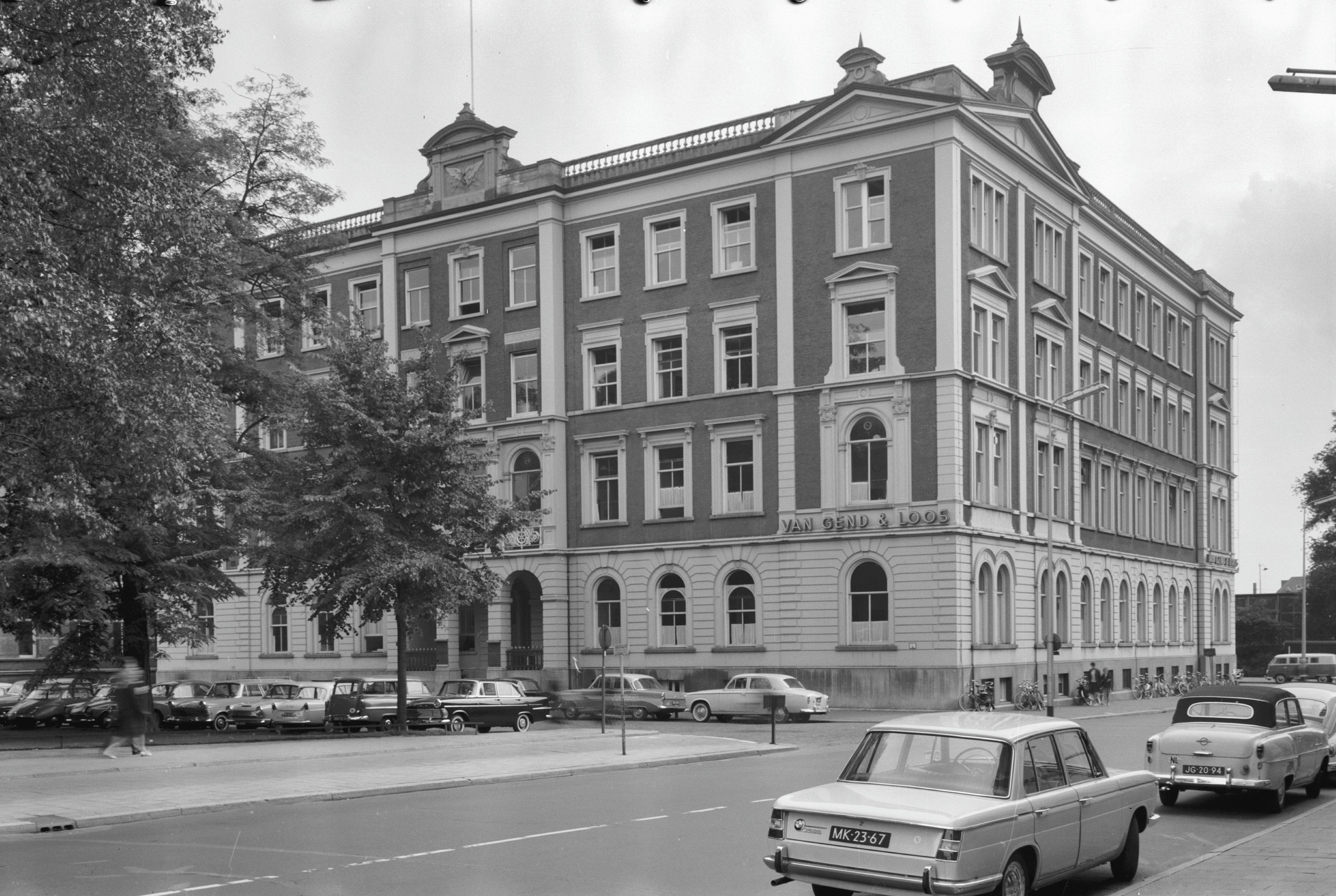 Bedrijfsgebouw/ Straatbeeld: Overzicht N.S. gebouw I